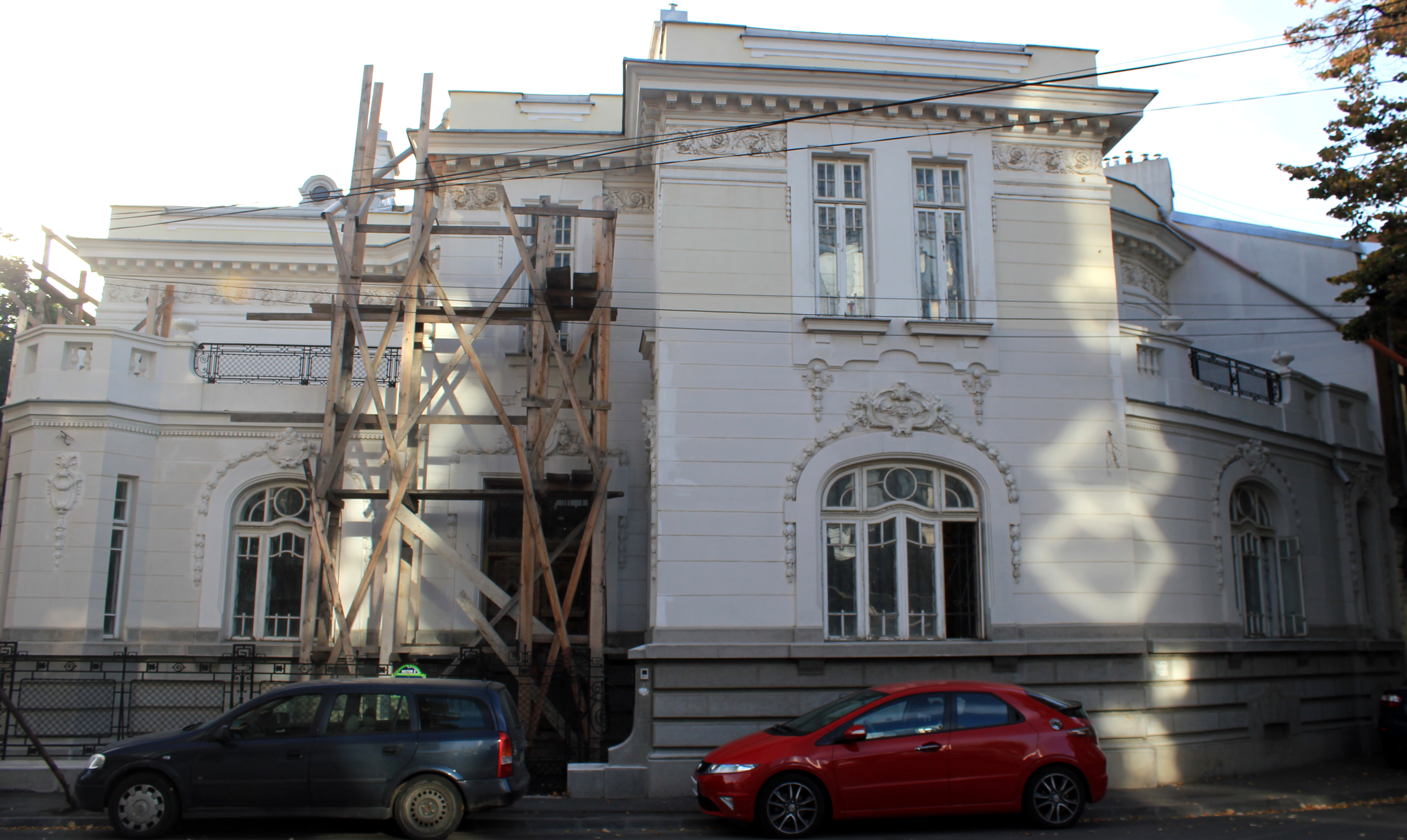 Casă "Constantin Kiritescu" str Kiritescu Constantin 41